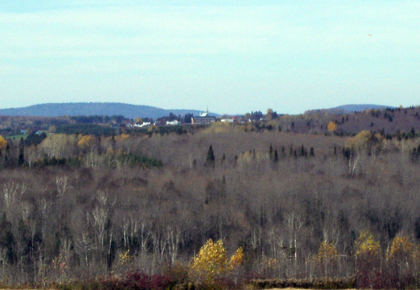 Saint-Alexis-de-Matapedia